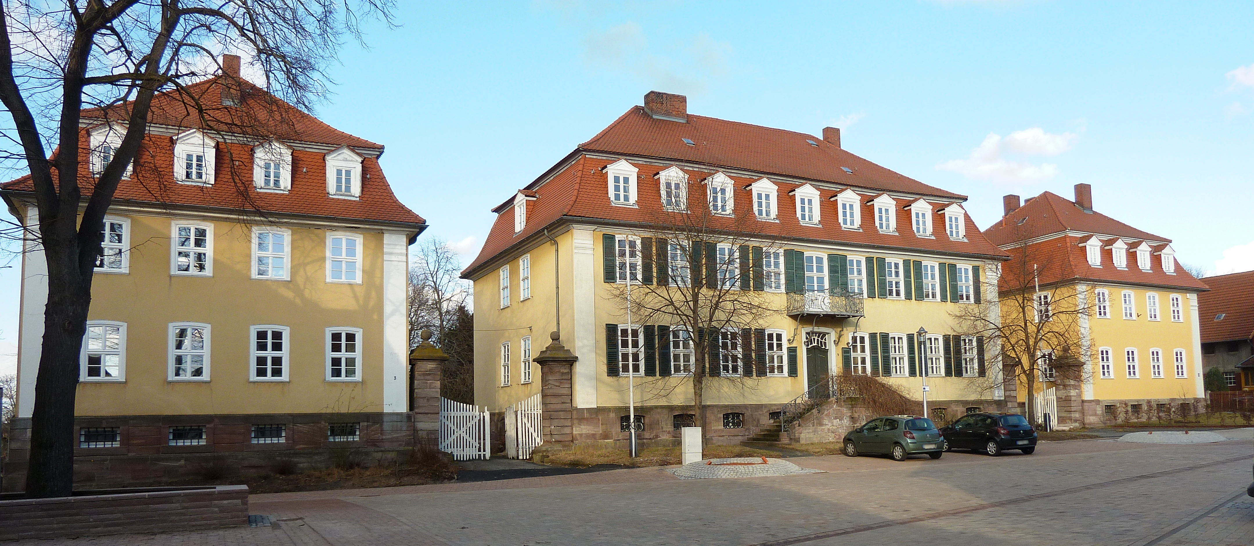 Amtshaus mit flankierenden Pavillons des ehemaligen hessischen Jagdschlosses in Bovenden, Niedersachsen, erbaut 1777 bis 1790